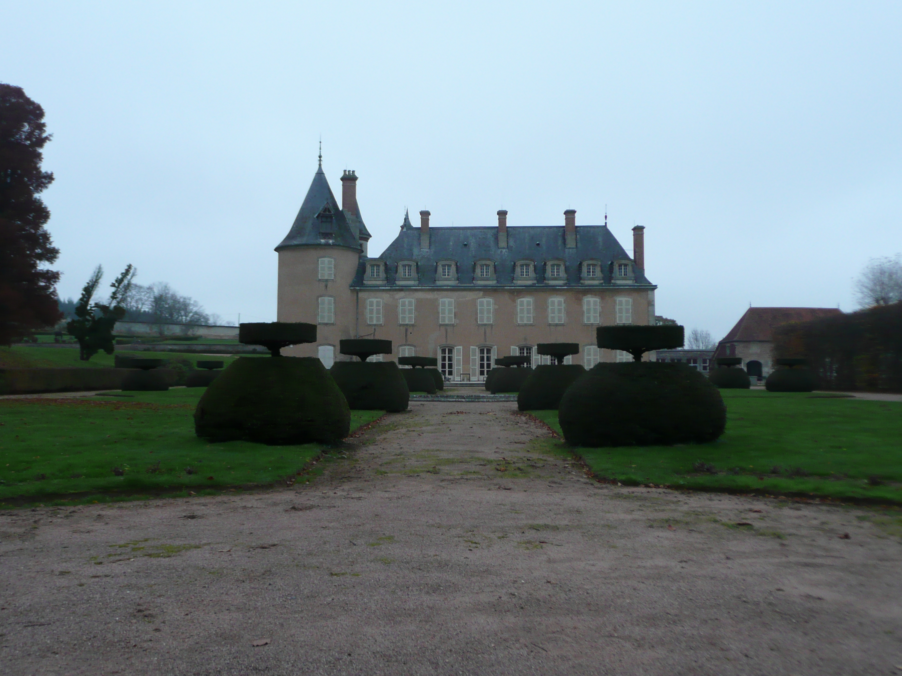 Château du Terreau (XIIIe, XIVe et XVIIIe siècles), à Verosvres (Saône-et-Loire, France)